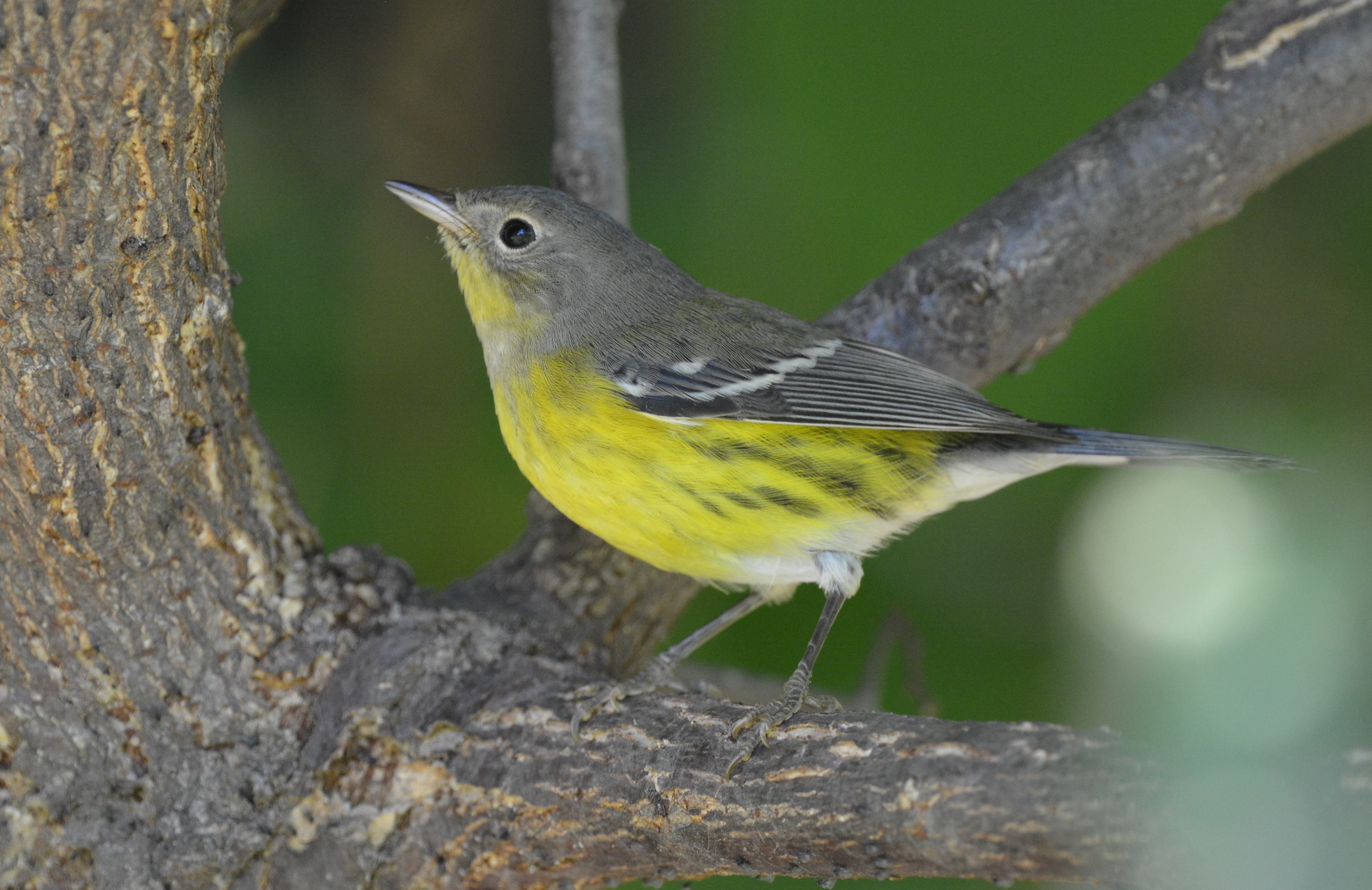 Carondelet 9/15